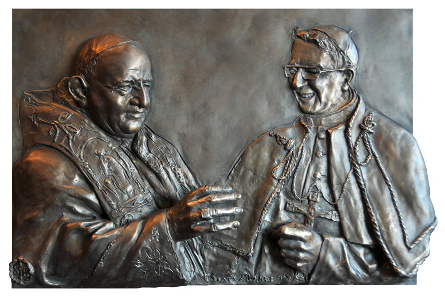 Formella in bronzo raffigurante i pontefici Giovanni XXIII e Giovanni Paolo I in dialogo, L'opera è stata realizzata da Franco Murer. Una formella di trova nella chiesa di San Rocco a Venezia e una nella cripta di San Tiziano (Vittorio Veneto - TV)